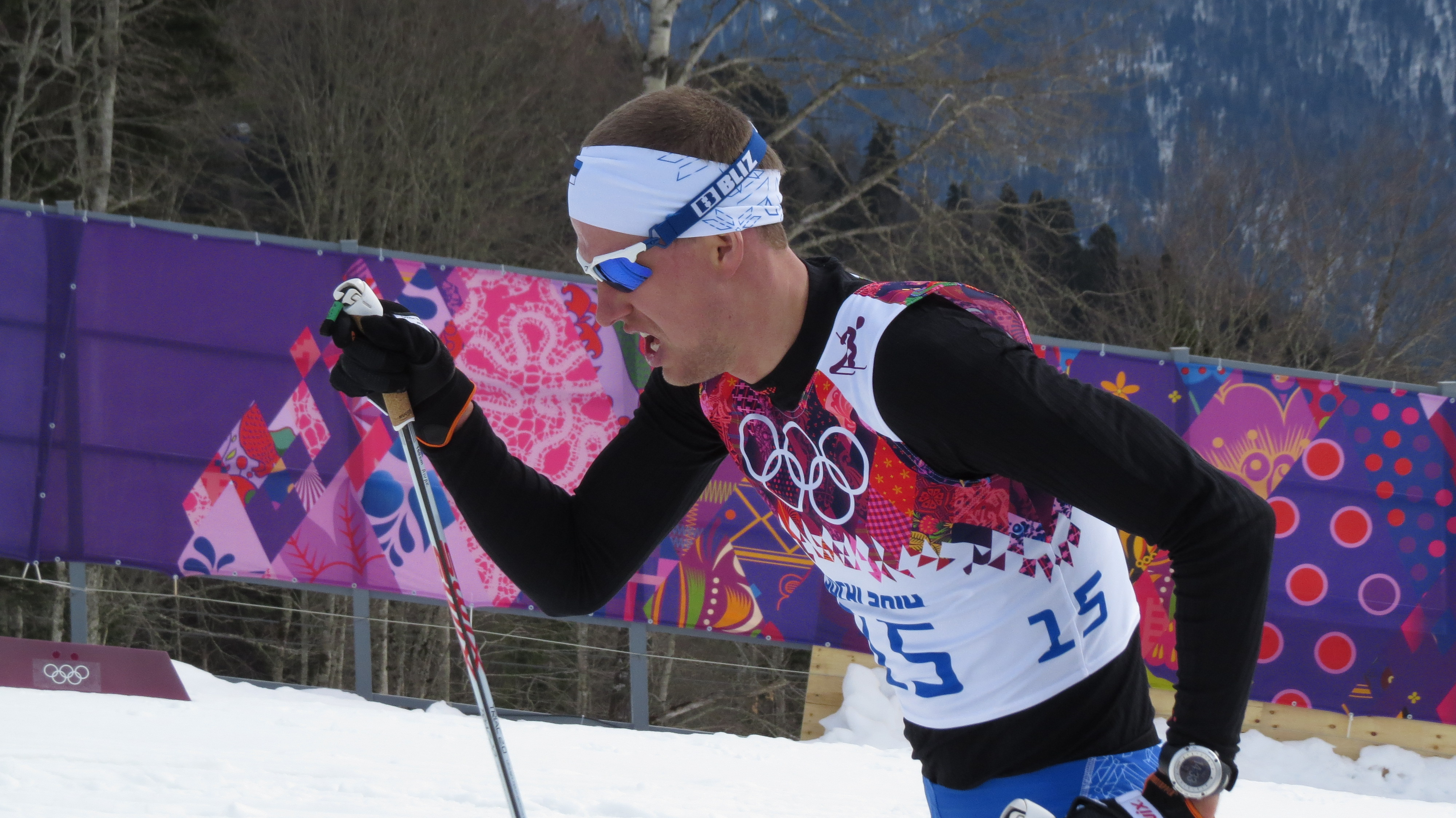 Лыжные гонки на зимних Олимпийских играх 2014 — 15 км классическим стилем (мужчины)